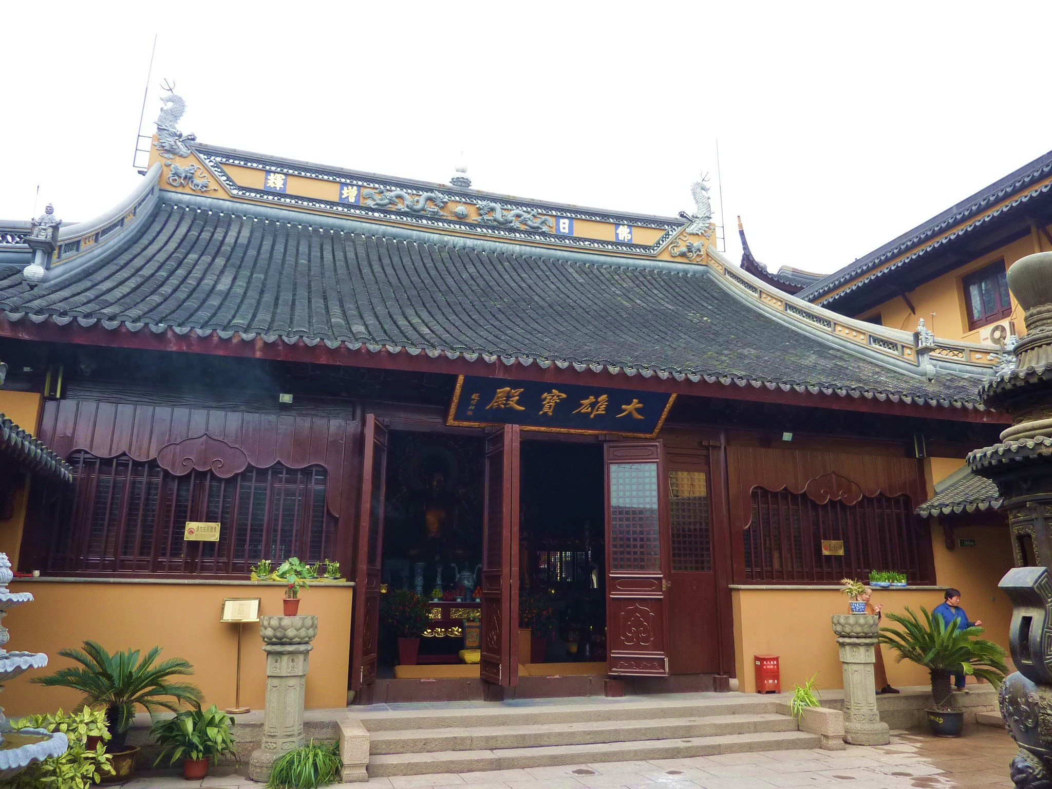 ·˙·ChinaUli2010·.· Shanghai